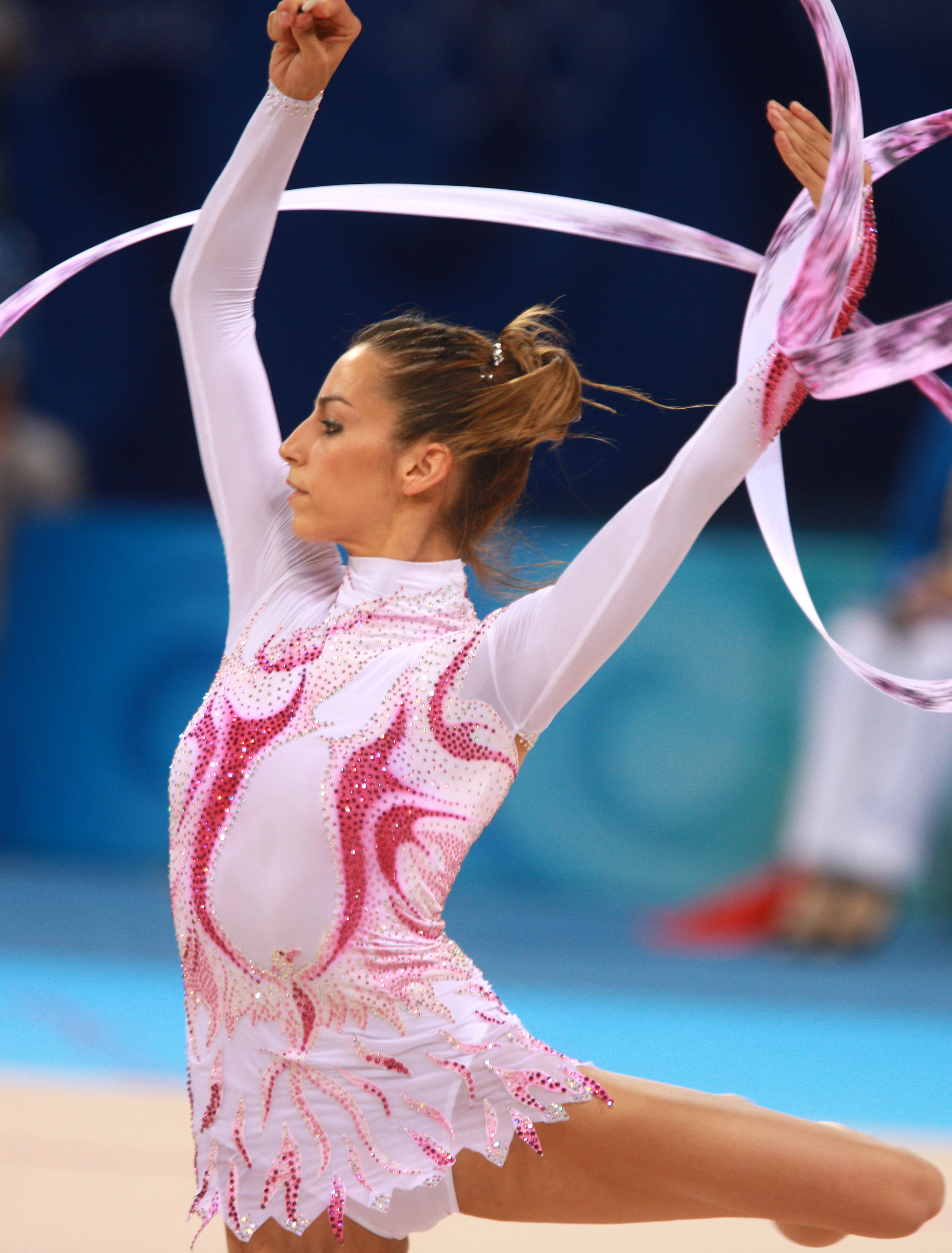 Almudena Cid en los Juegos Olímpicos de Pekín 2008.